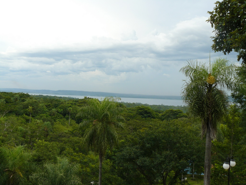 LAGO YPACARAI